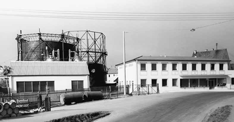 Betriebsstelle von Erdgas Schwaben in Donauwörth, 1963